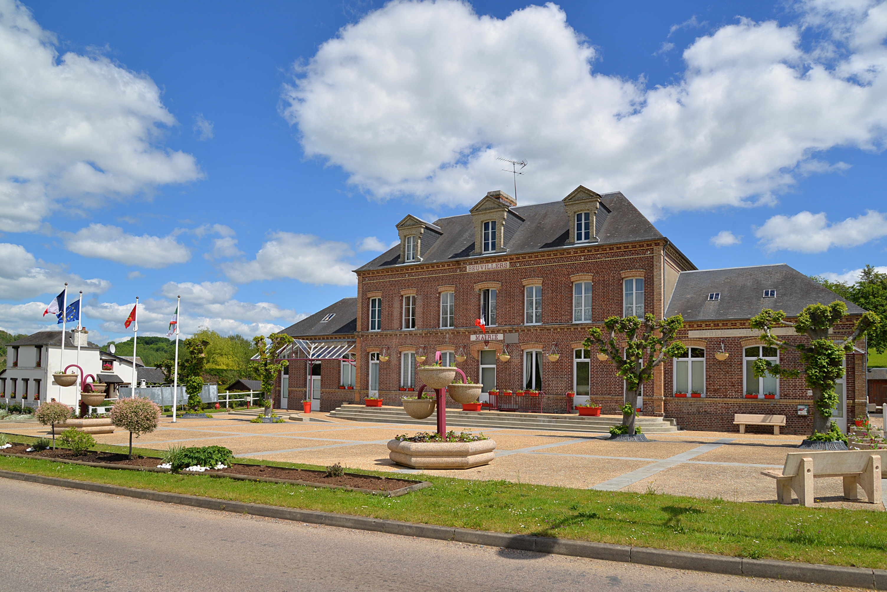 Beuvillers (Calvados)